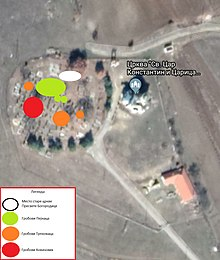 На овој слици видимо сателитски снимак гробља у селу Коретишту. На гробљу су обележена подручја која заузимају одређене породице у односу на стару цркву. Положај гробова је материјални докац предања Пејнаца јер су њихови гробови најближи цркви и зато је ова слика важна. In this picture we see a satellite image of the cemetery in Koretište village. The cemetery marked areas that occupy certain families in relation to the old church. The location of the graves is a material argument of the Paeonian tradition because their graves are closest to the church and that is why this image is important.